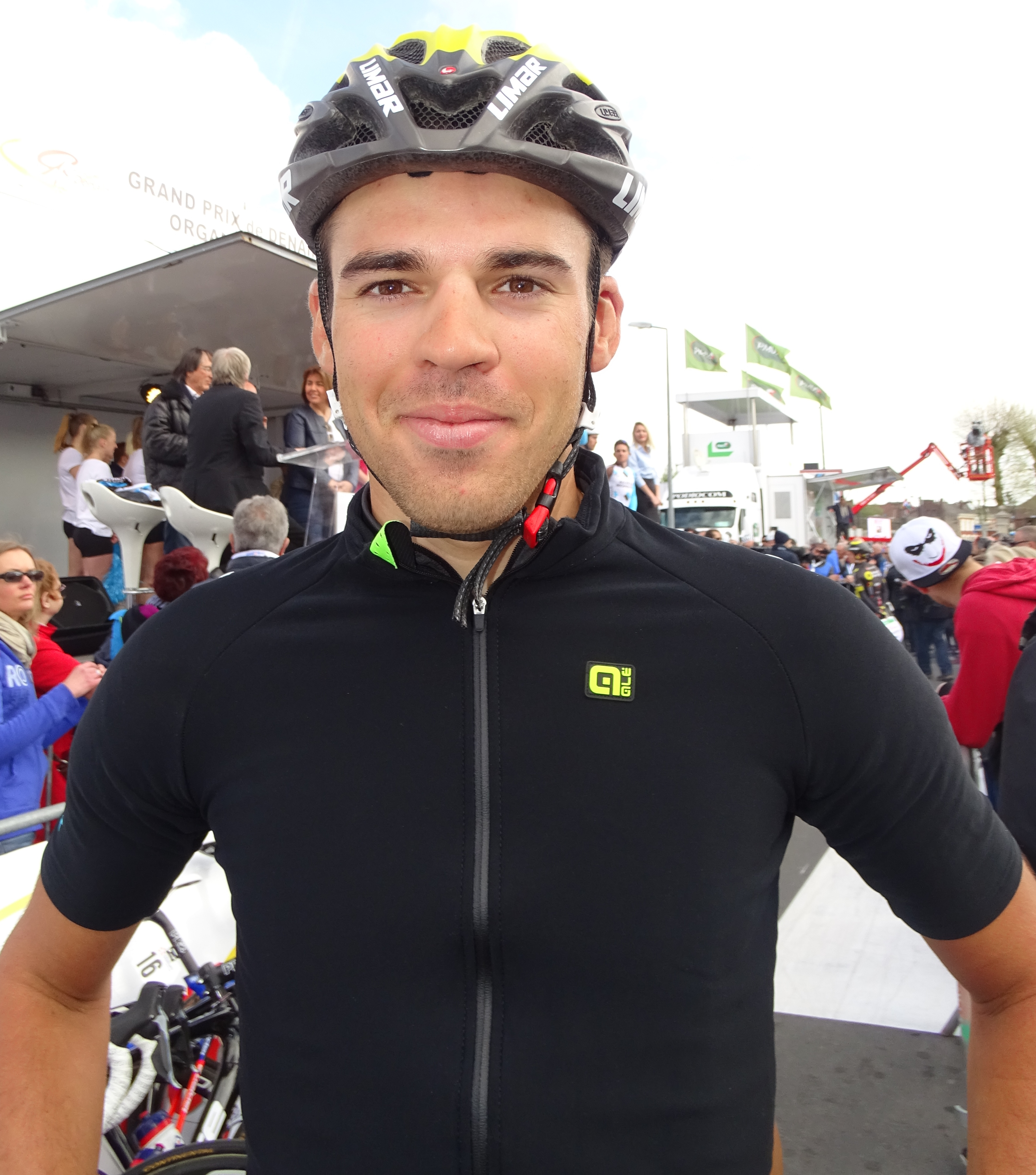 Reportage réalisé le jeudi 13 avril à l'occasion du départ et de l'arrivée du Grand Prix de Denain 2017 à Denain, Nord, Nord-Pas-de-Calais-Picardie, France.